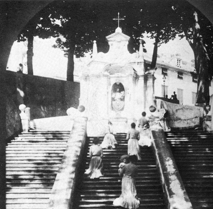 La Scala Santa del santuario dell'Acquasanta in una foto del 1898, Acquasanta, Mele, Liguria, Italia